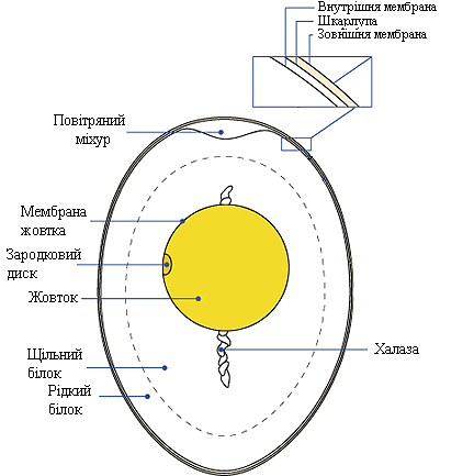 Egganatomy2.gif: Будова пташиного яйця